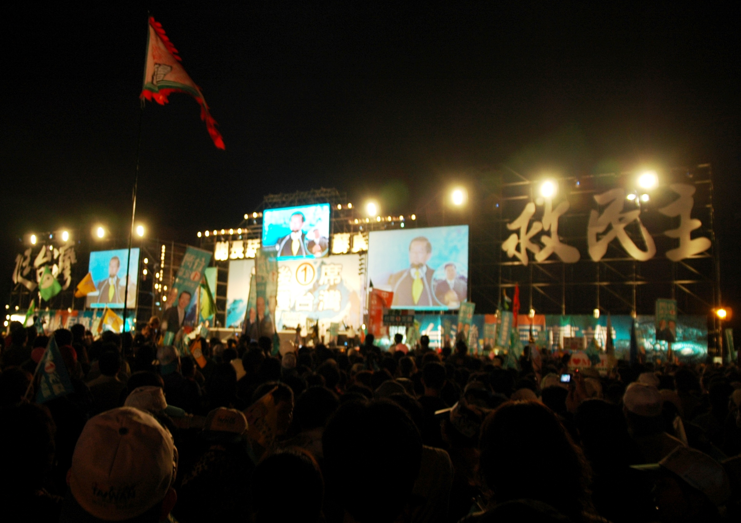 2008年中華民國總統選舉，民主進步黨挺台灣救民主造勢晚會。